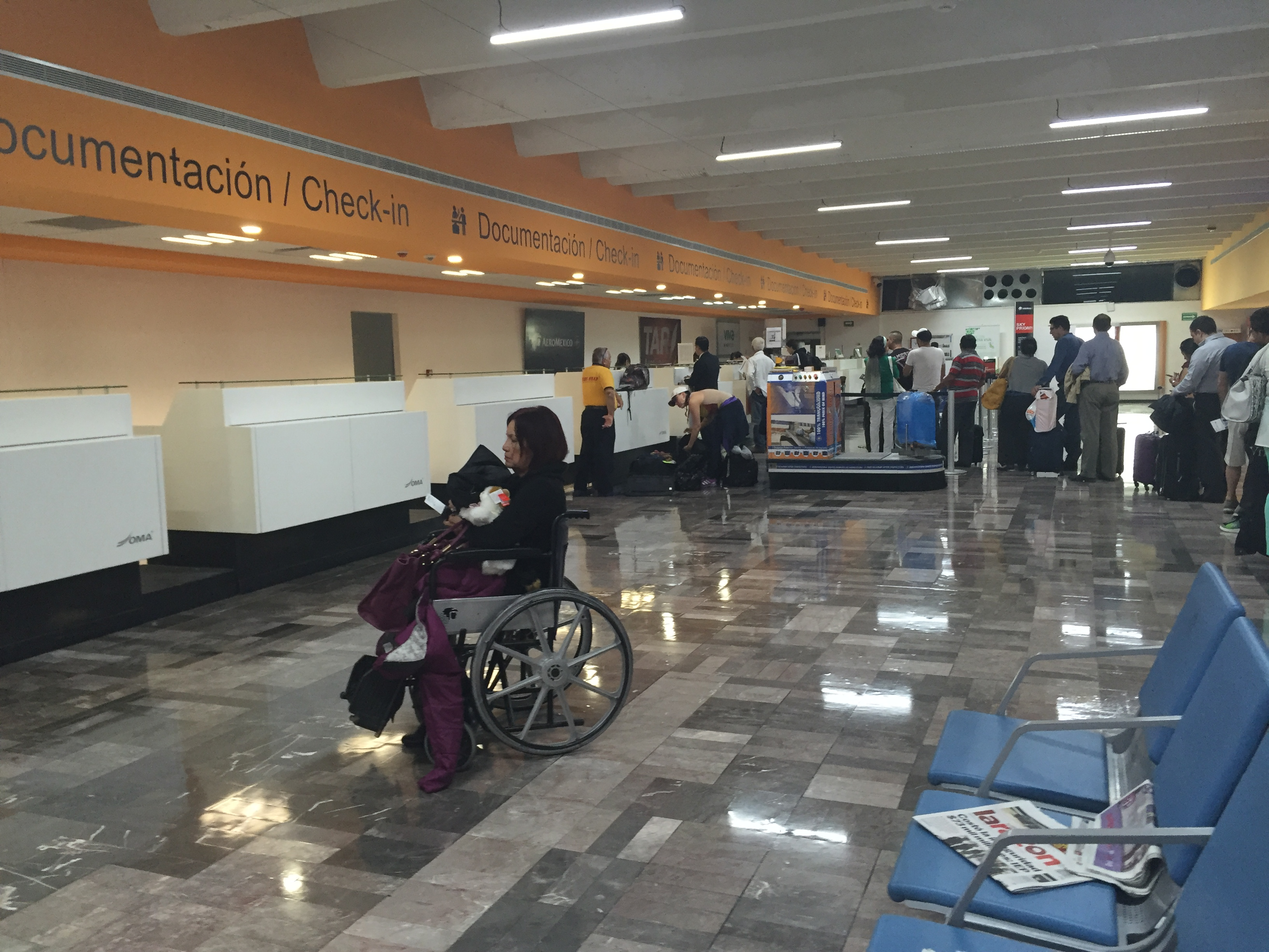 Área de documentación del Aeropuerto Internacional de Tampico.